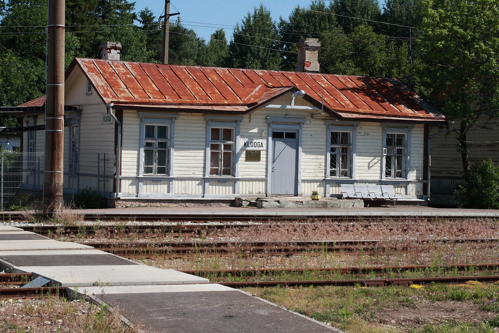 Klooga jaamahoone, suvi 2011.